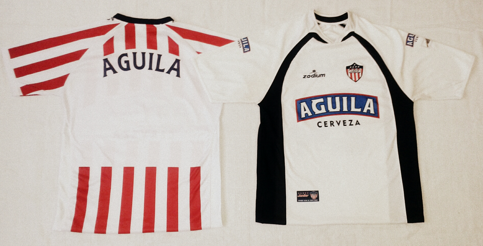 Indumentaria Zodium